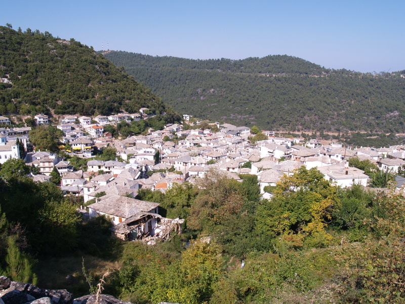 Panagia (Thasos) aus Süd